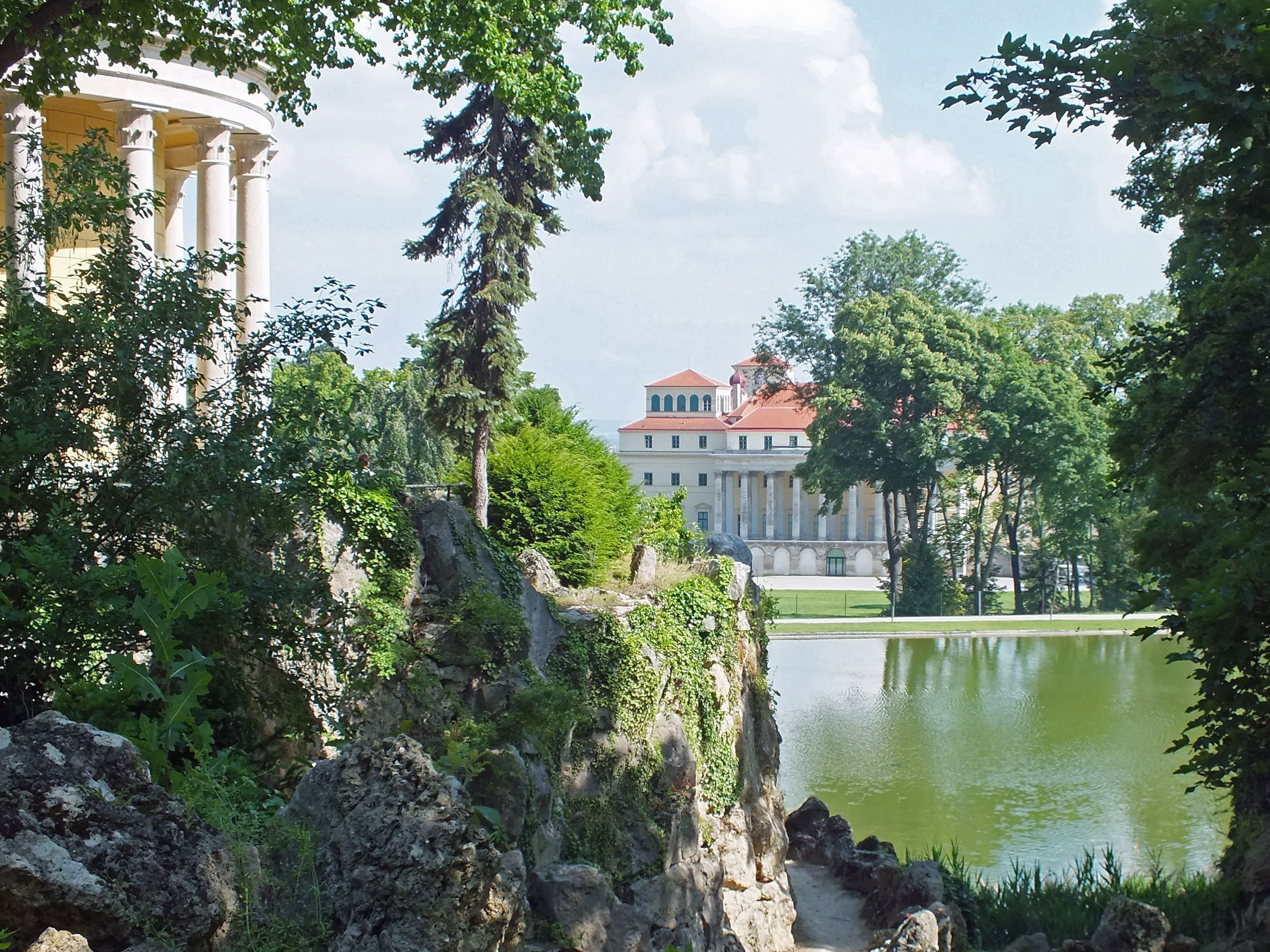 Blick vorbei am Leopoldinentempel im Schloßpark Eisenstadt zum Schloss